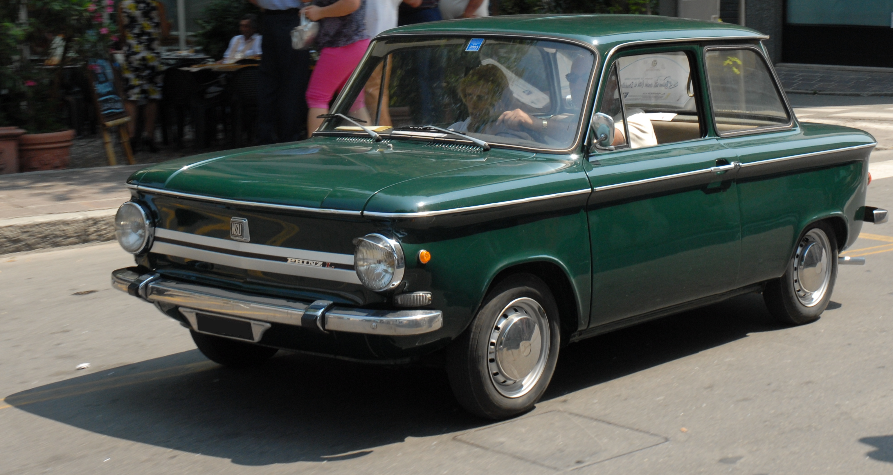 NSU Prinz L at 2° Raduno Auto Storiche Città di Stradella (Pavia), 22 June 2008.